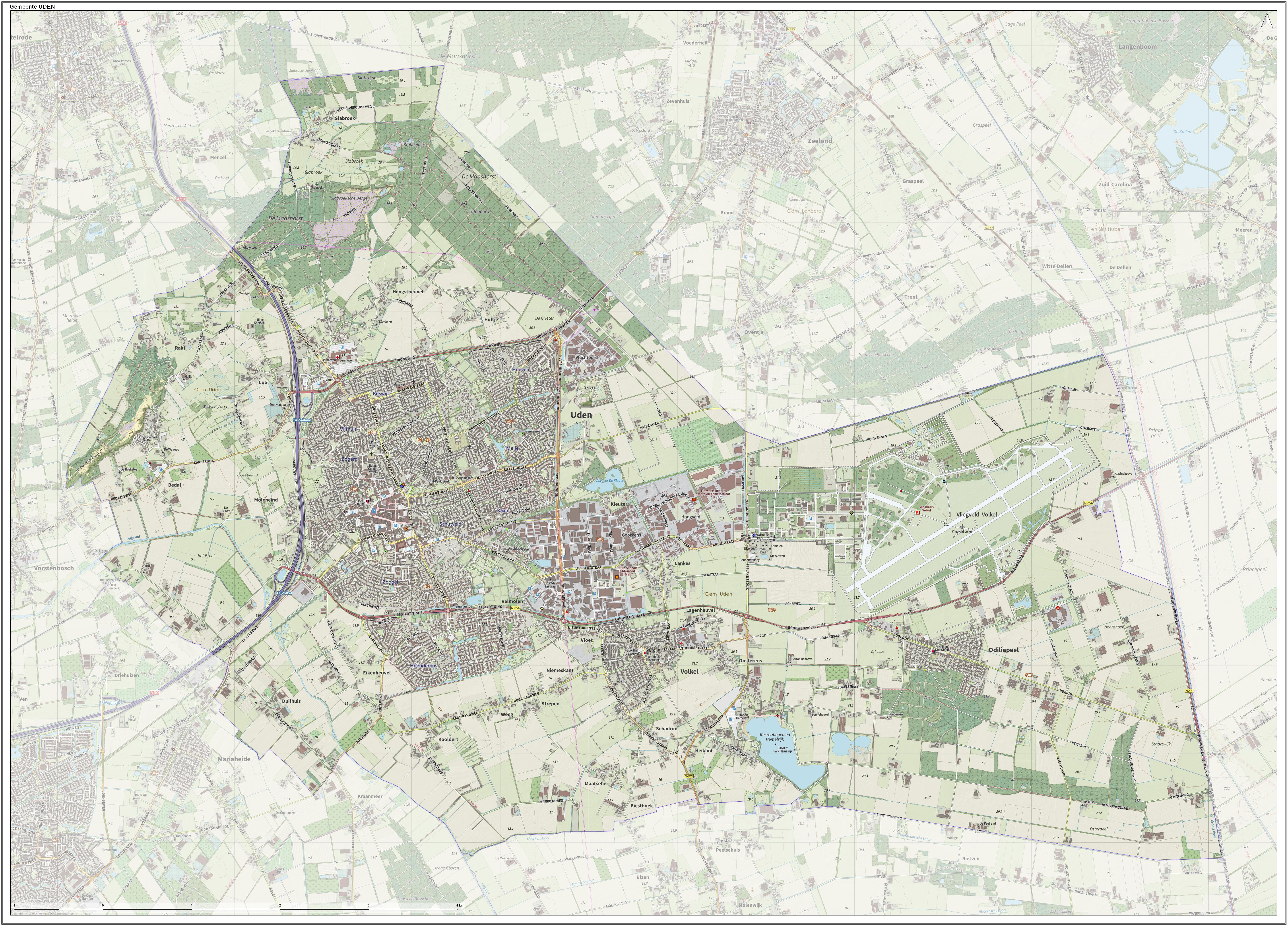 Topografische gemeentekaart. Resolutie: 400 pixels/km. Kaartbeeld samengesteld uit de open geodata van de Top10NL en Top25namen (Kadaster), Creative Commons-BY licentie. Gebouwvlakken uit open geodata BAG extract. Wegen uit de OpenStreetMap, OpenStreetMap community. Reliëfschaduw uit de Actuele Hoogtekaart AHN2. Samenstelling en kleurenschema: Jan-Willem van Aalst, met QGIS. Zie ook de Legenda.